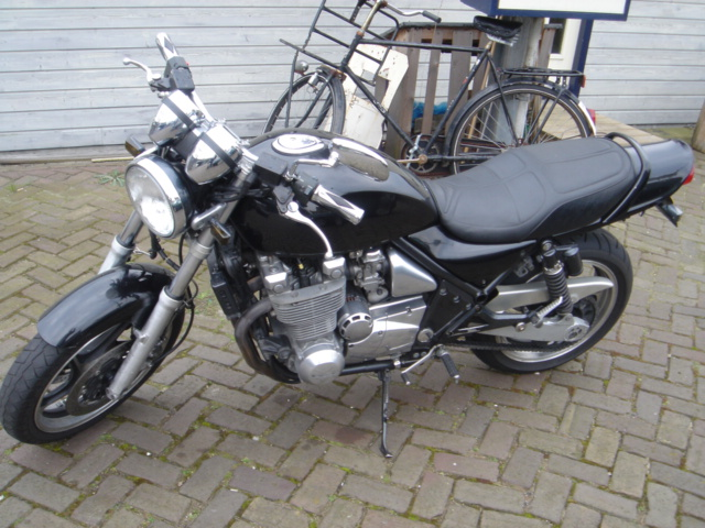 Eigen foto van eigen motor.